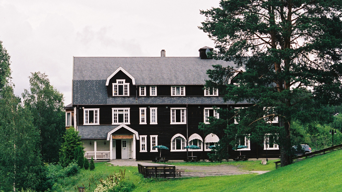 Folkemusikksenteret i Buskerud, Sigdal.